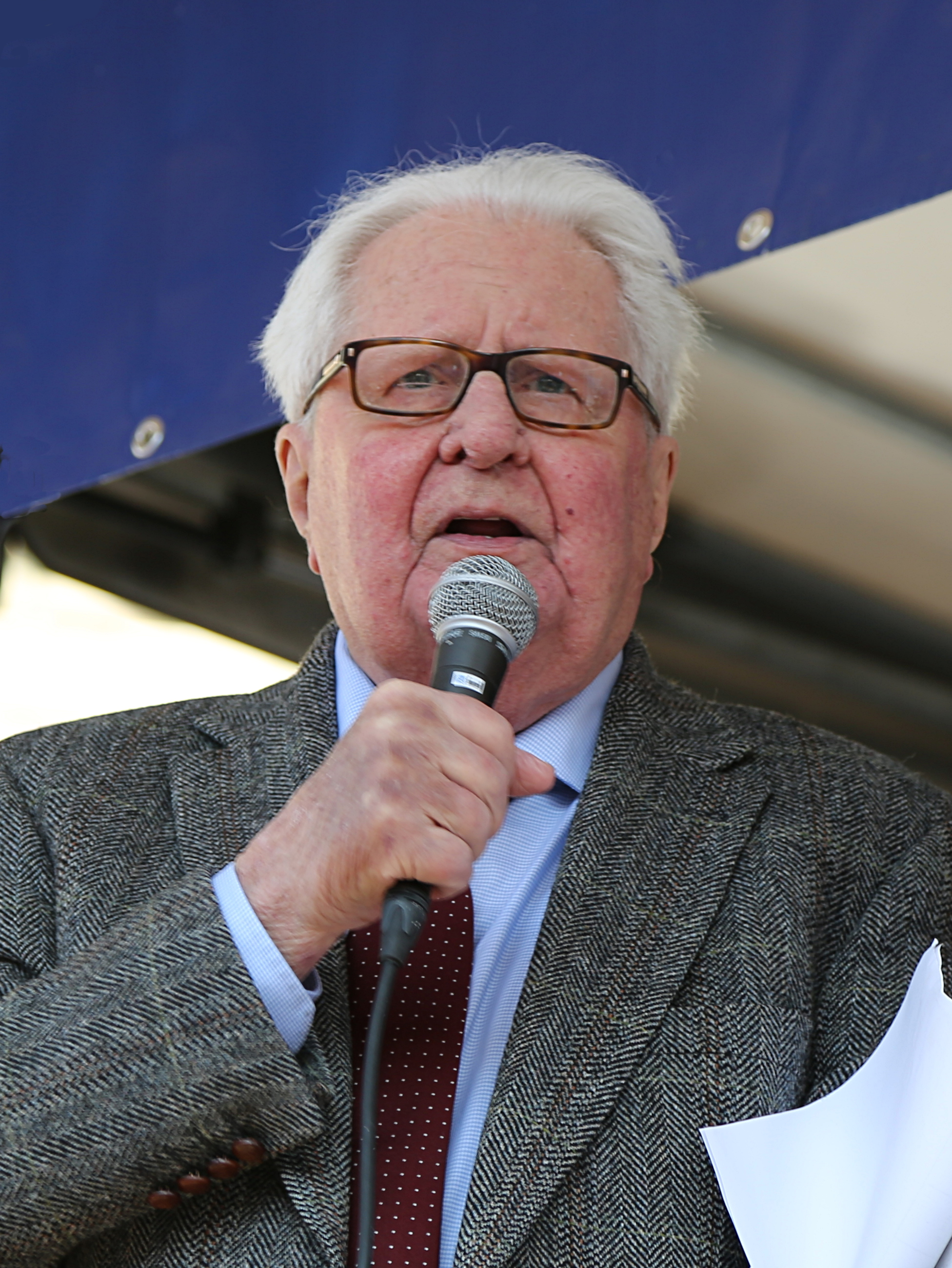 Hans-Jochen Vogel am 9. April 2017 auf der Pulse of Europe Veranstaltung in München.